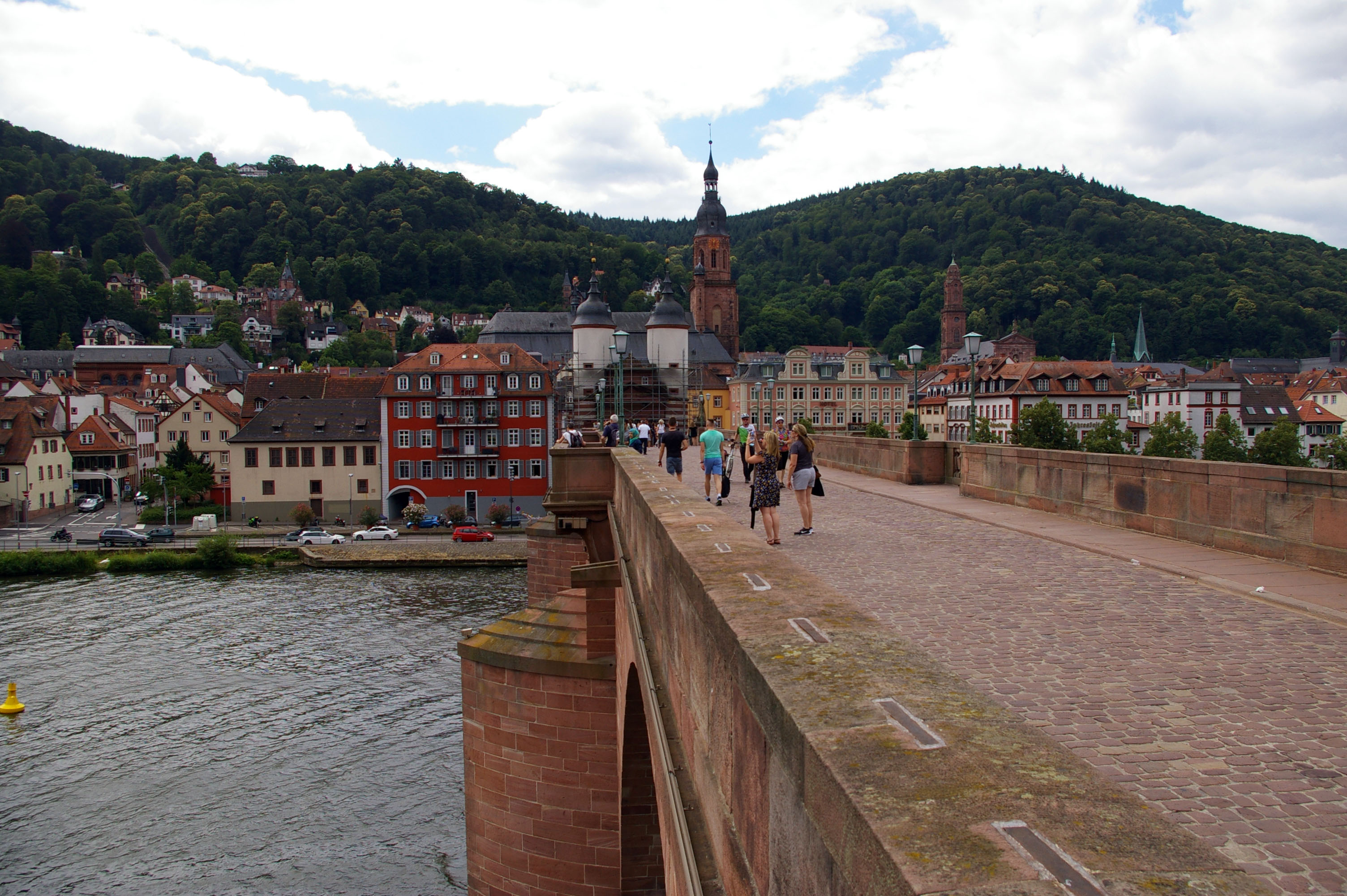 Most Heidelberg